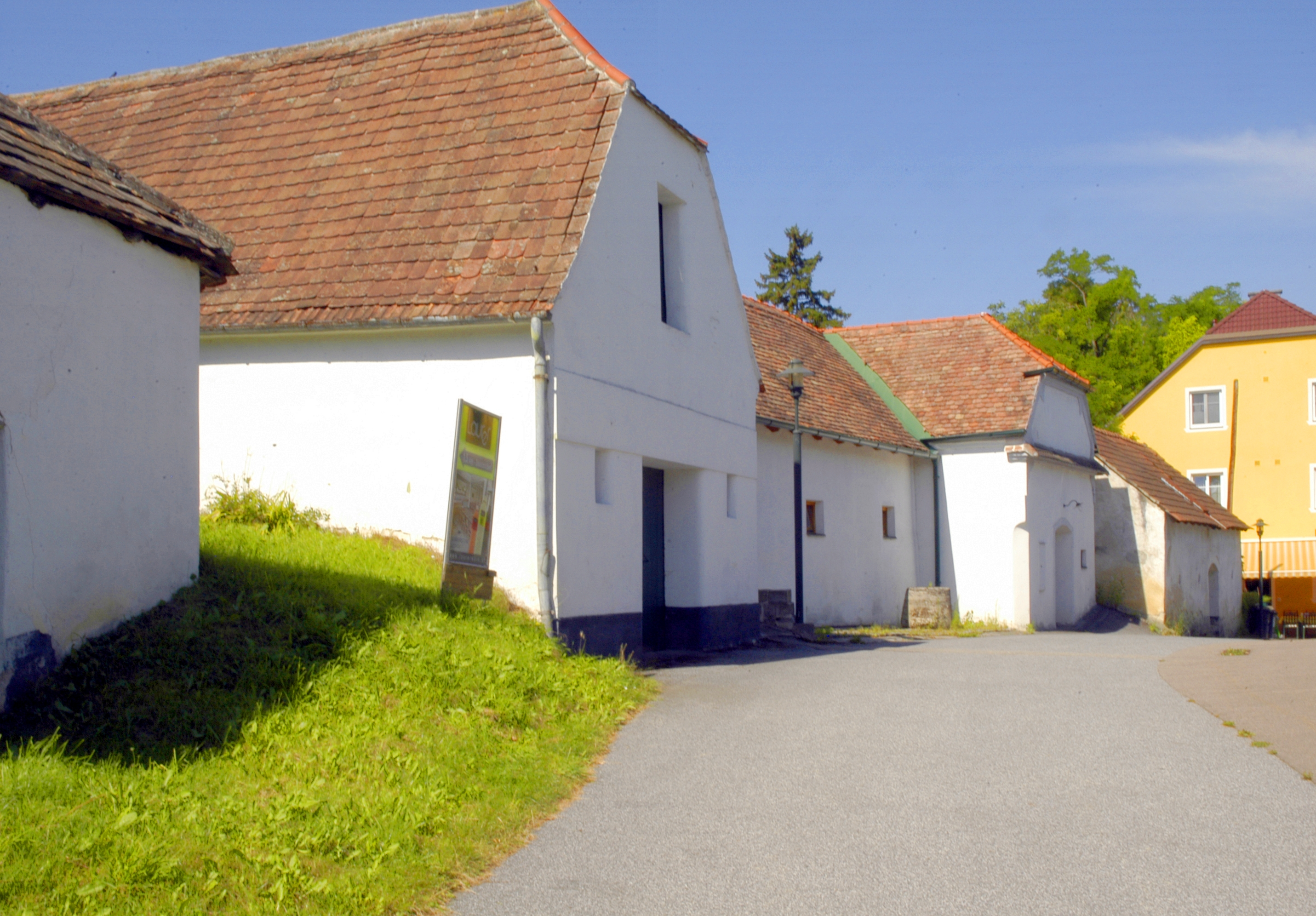 Kellergasse in Dietmannsdorf, Gemeinde Zellerndorf, Niederösterreich